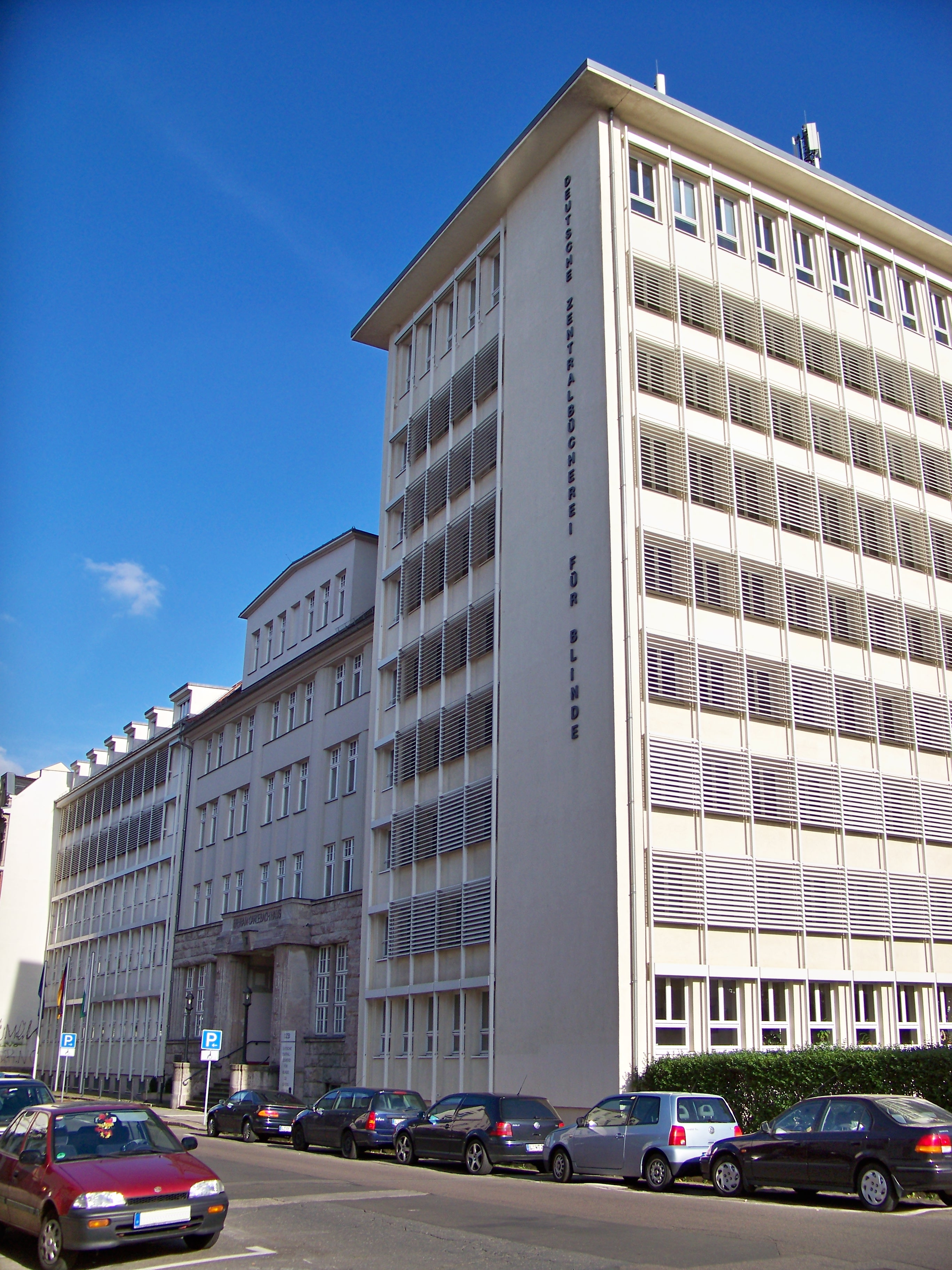 Deutsche Zentralbücherei für Blinde zu Leipzig (DZB) in der Gustav-Adolf-Straße Ecke Färberstraße im Stadtteil Zentrum-Nordwest